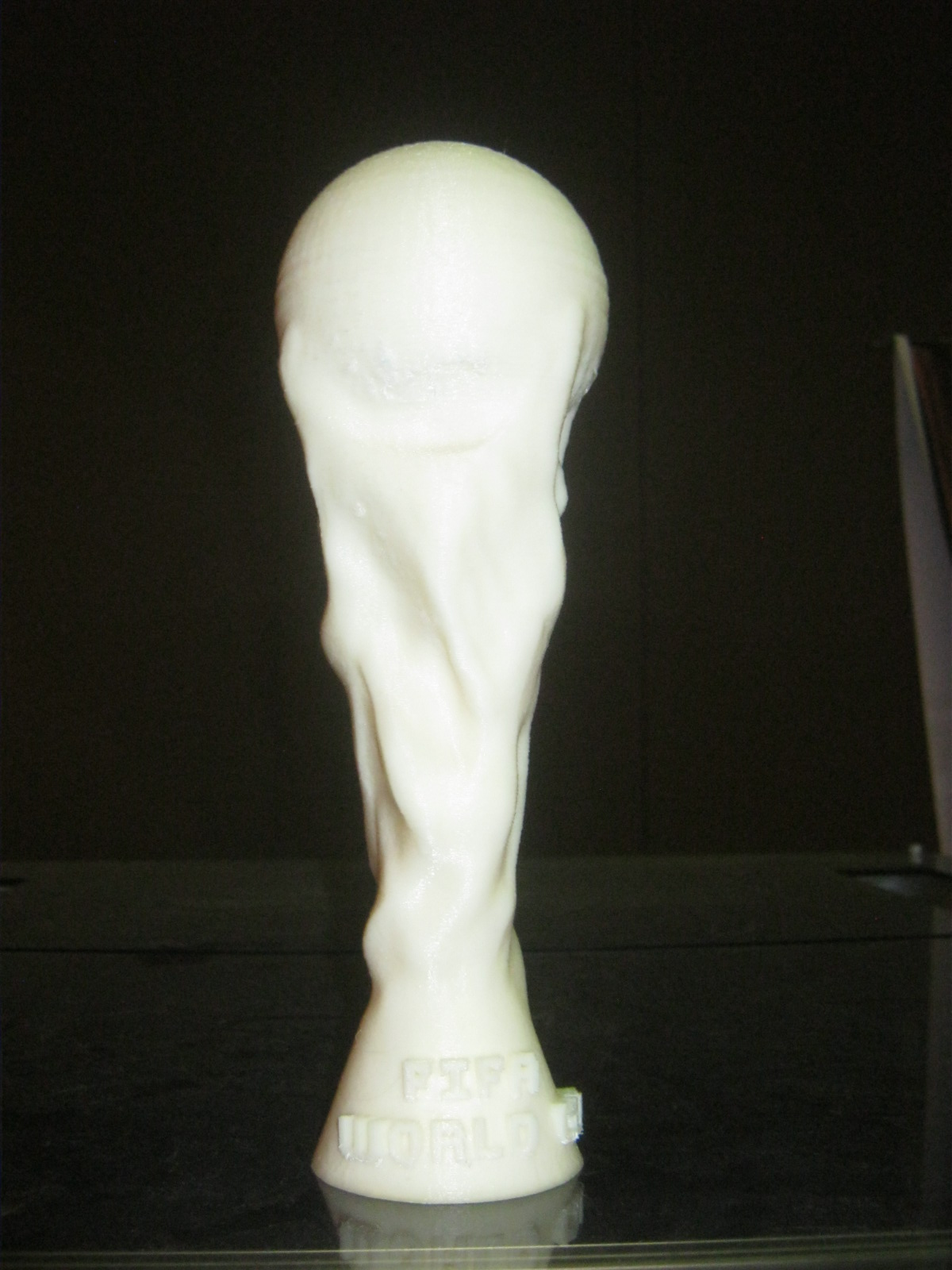 Copa de la Copa mundial de fútbol hecha por una impresora 3D.